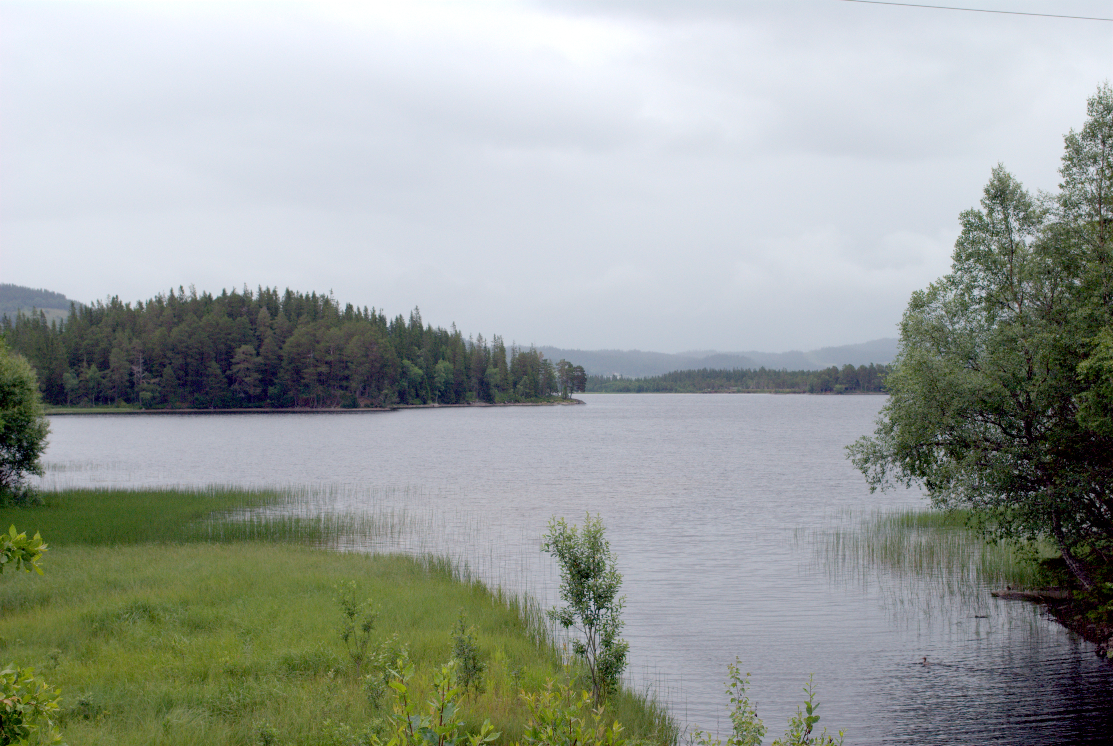 Hostovatnet i Meldal og Orkdal kommuner i Sør-Trøndelag.